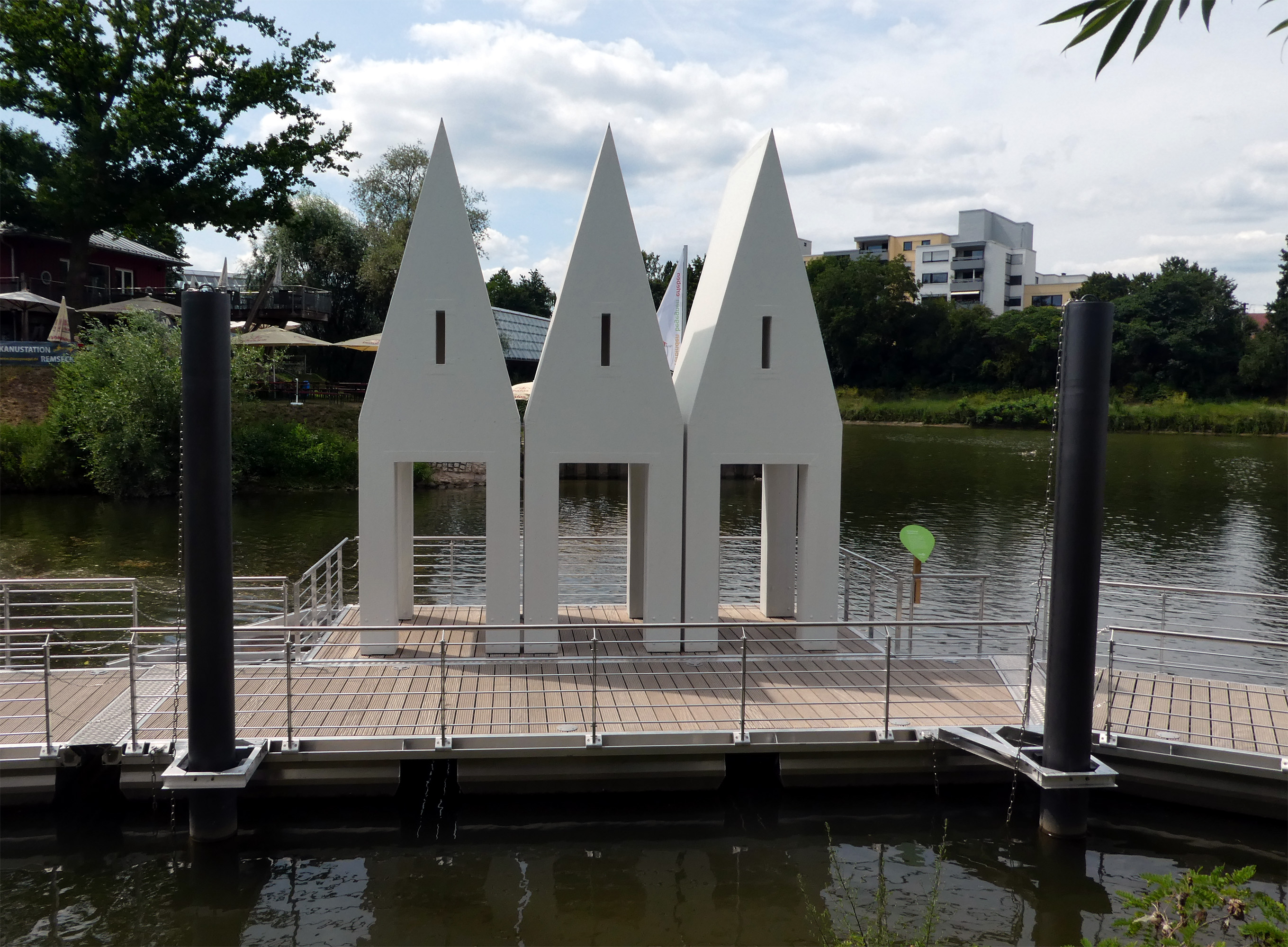 Remseck - "Badehaus". Das Bauwerk entstand als Station 16 der "16 Stationen" der Remstal-Gartenschau 2019.